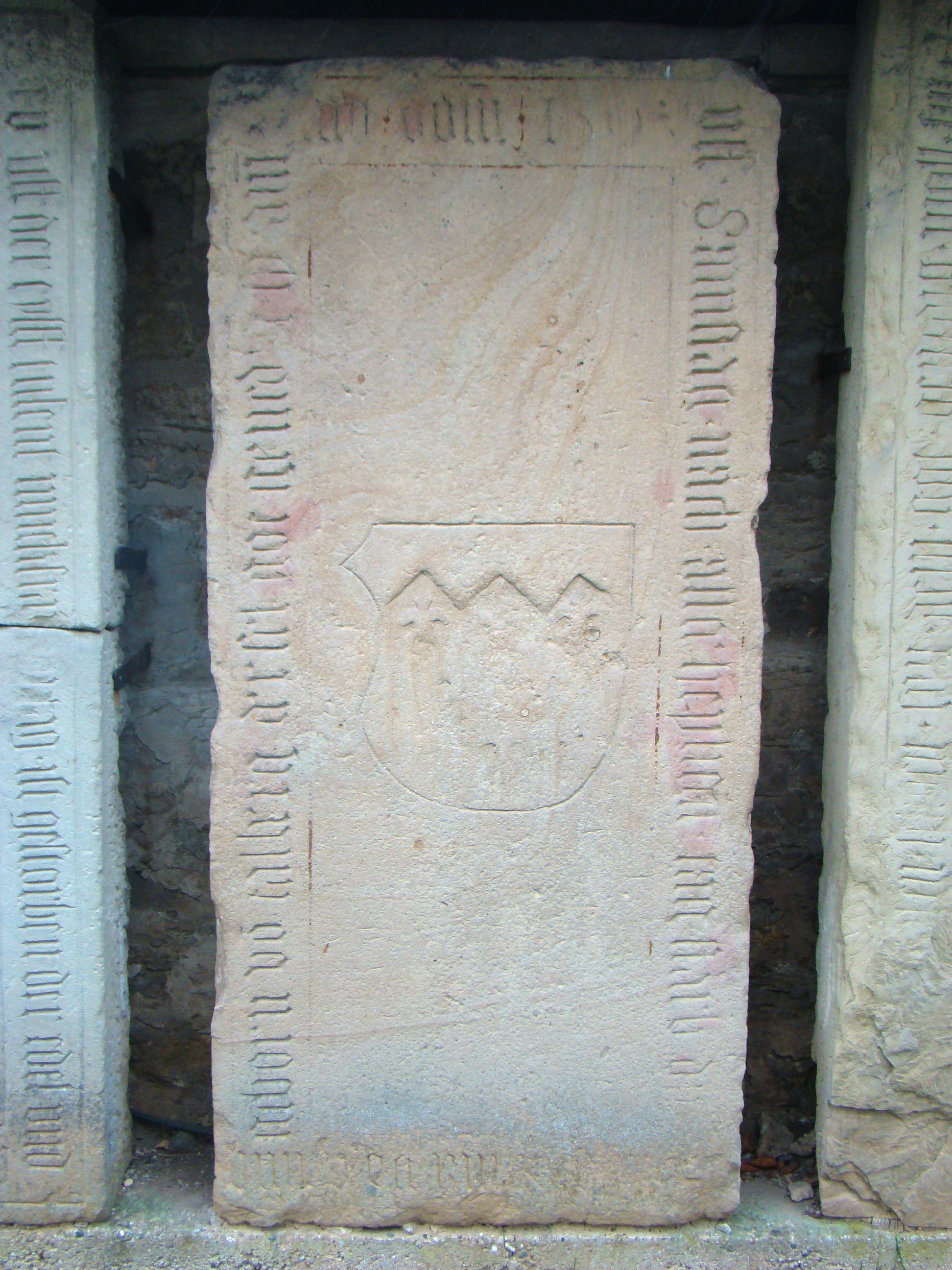 Historische Grabmale beim Unterschloss Gemmingen: Anna von Dalberg († 1503), Frau von Pleikard von Gemmingen († 1515)